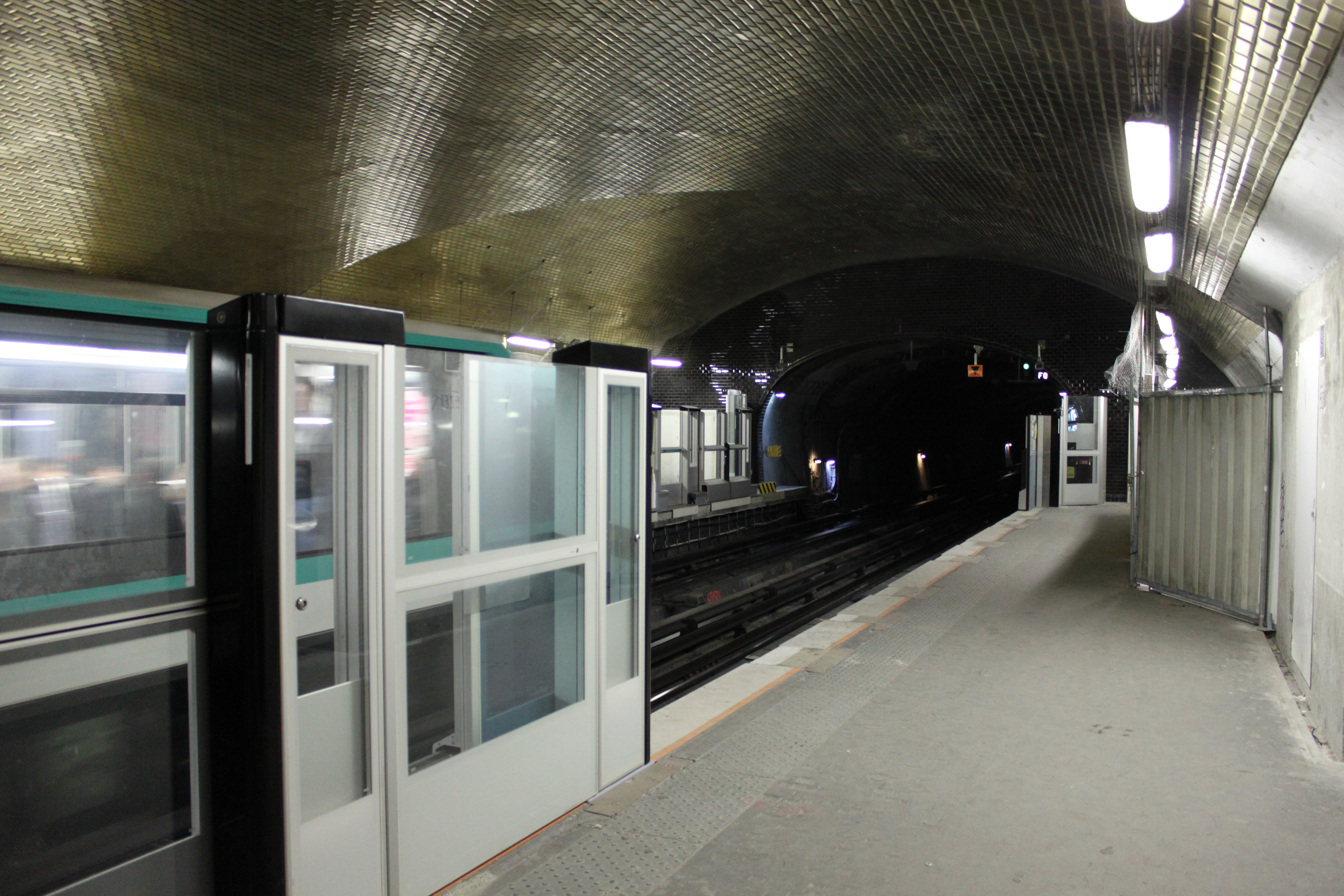 Installation des portes palières en cours à la station Franklin D. Roosevelt pendant la période d'automatisation de la ligne 1 du métro de Paris.